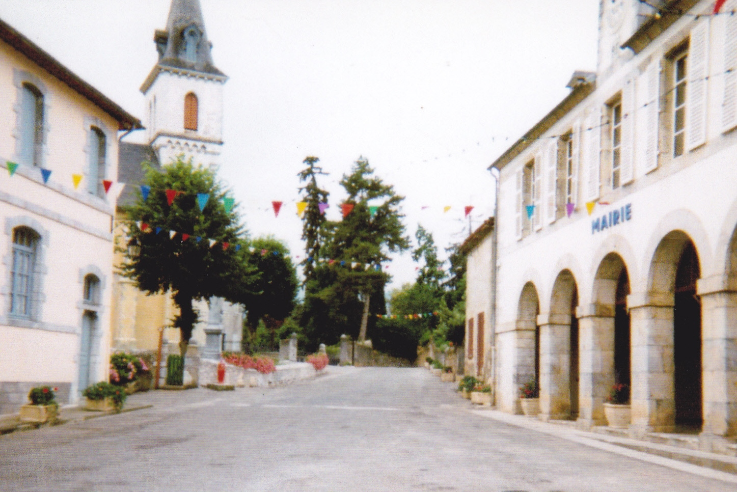 La Placette et ses bâtiments communaux (école de filles, église, mairie)